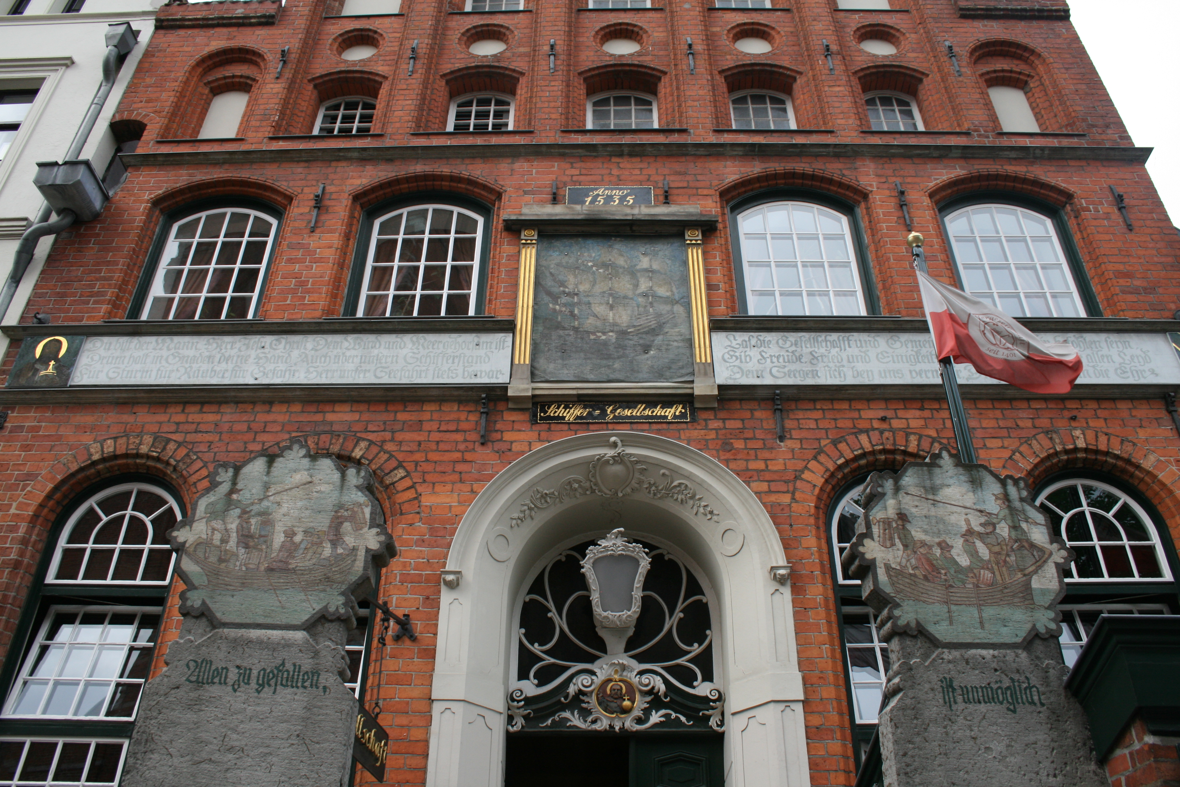 Schiffergesellschaft Lübeck